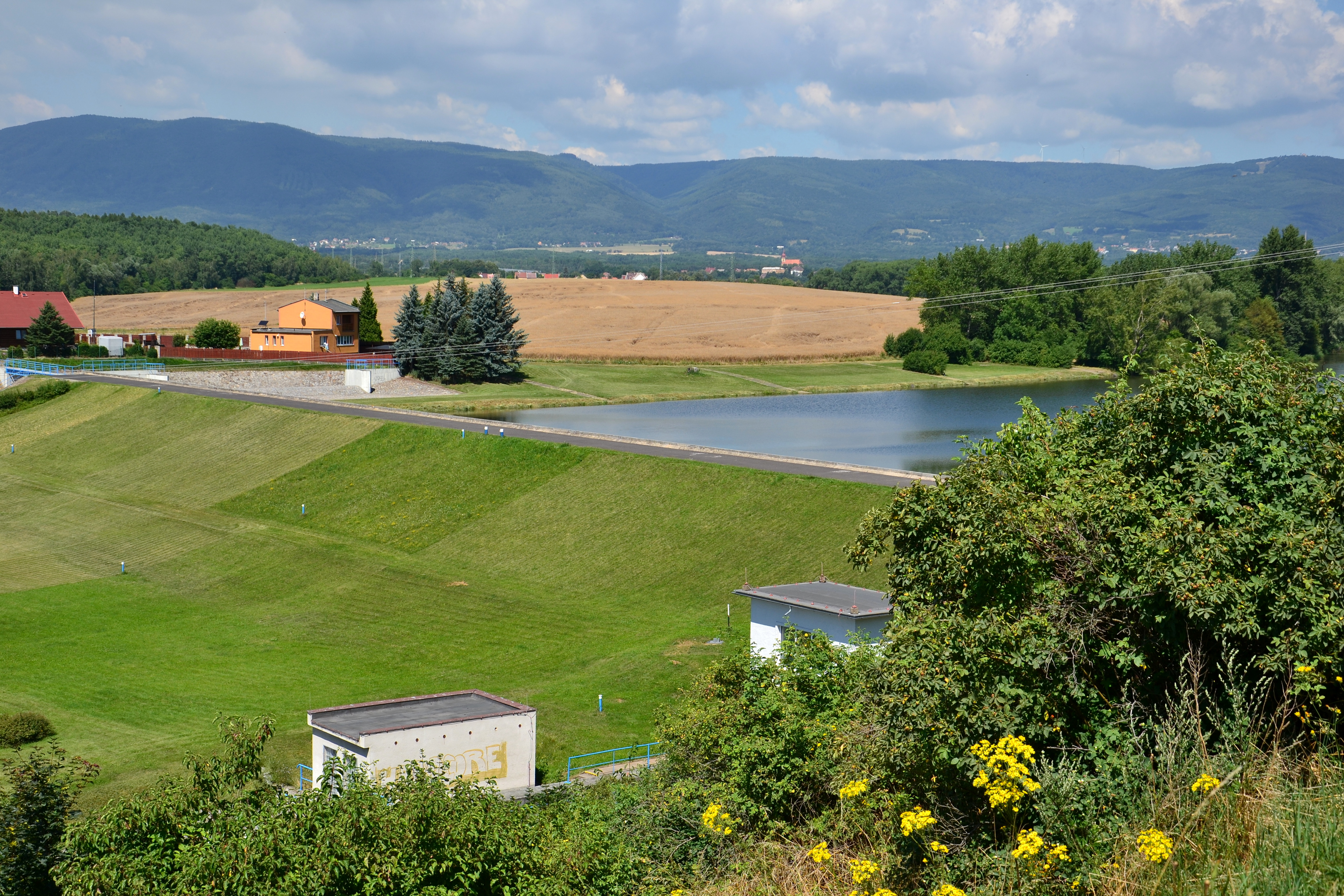 Pohled na hráz z okraje slovanského hradiště